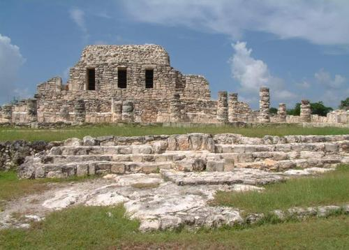 Maya Ruins in Mayapan